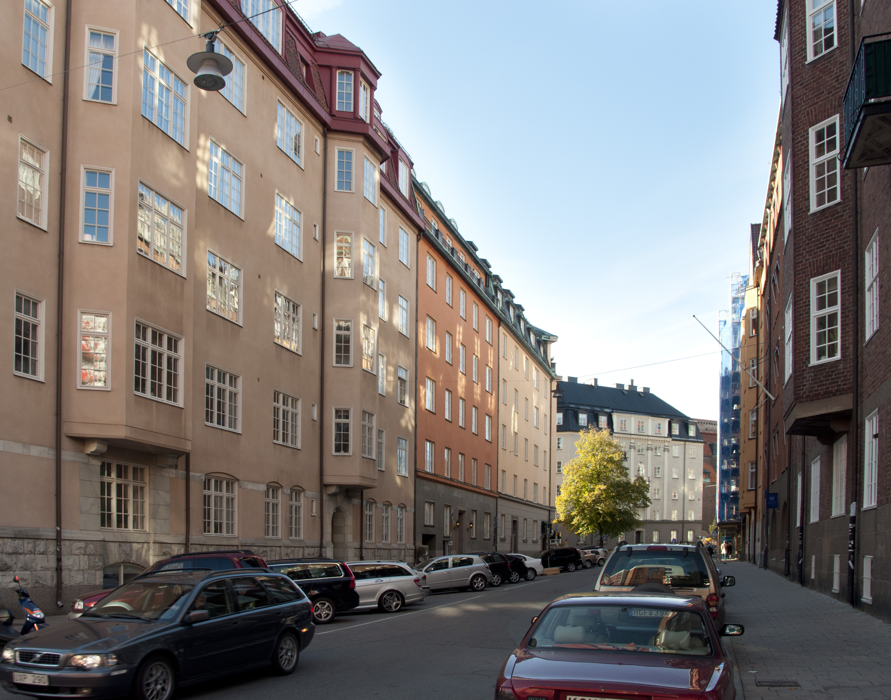 Bältgatan